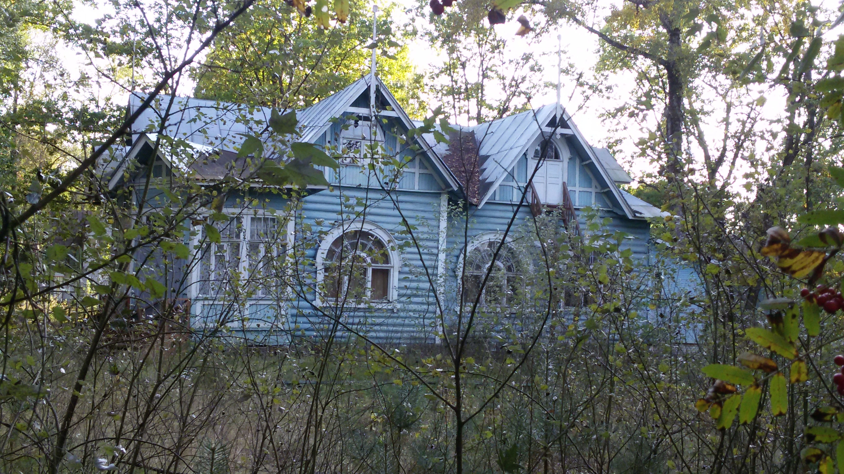 Дача Б.Н. Кана: Парковая улица, 14 литера Б, Сестрорецк, Курортный район, Санкт-Петербург